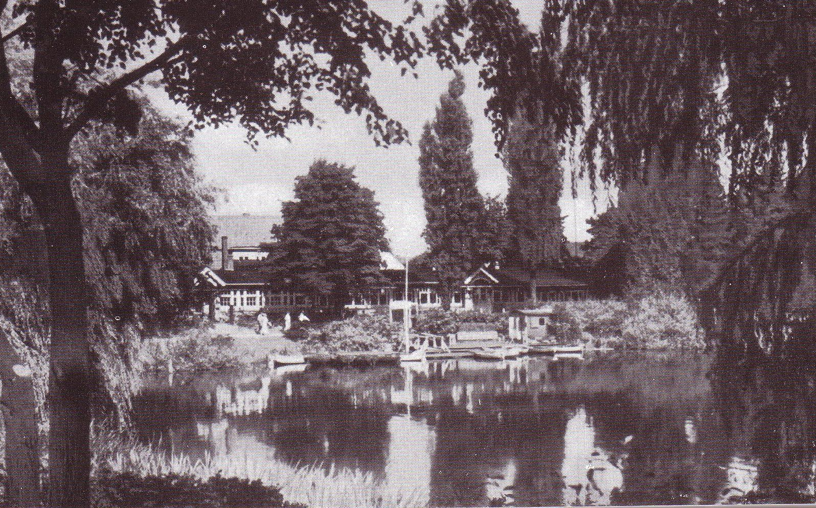 Das Gartenrestaurant Oberteichterrasse in Königsberg.